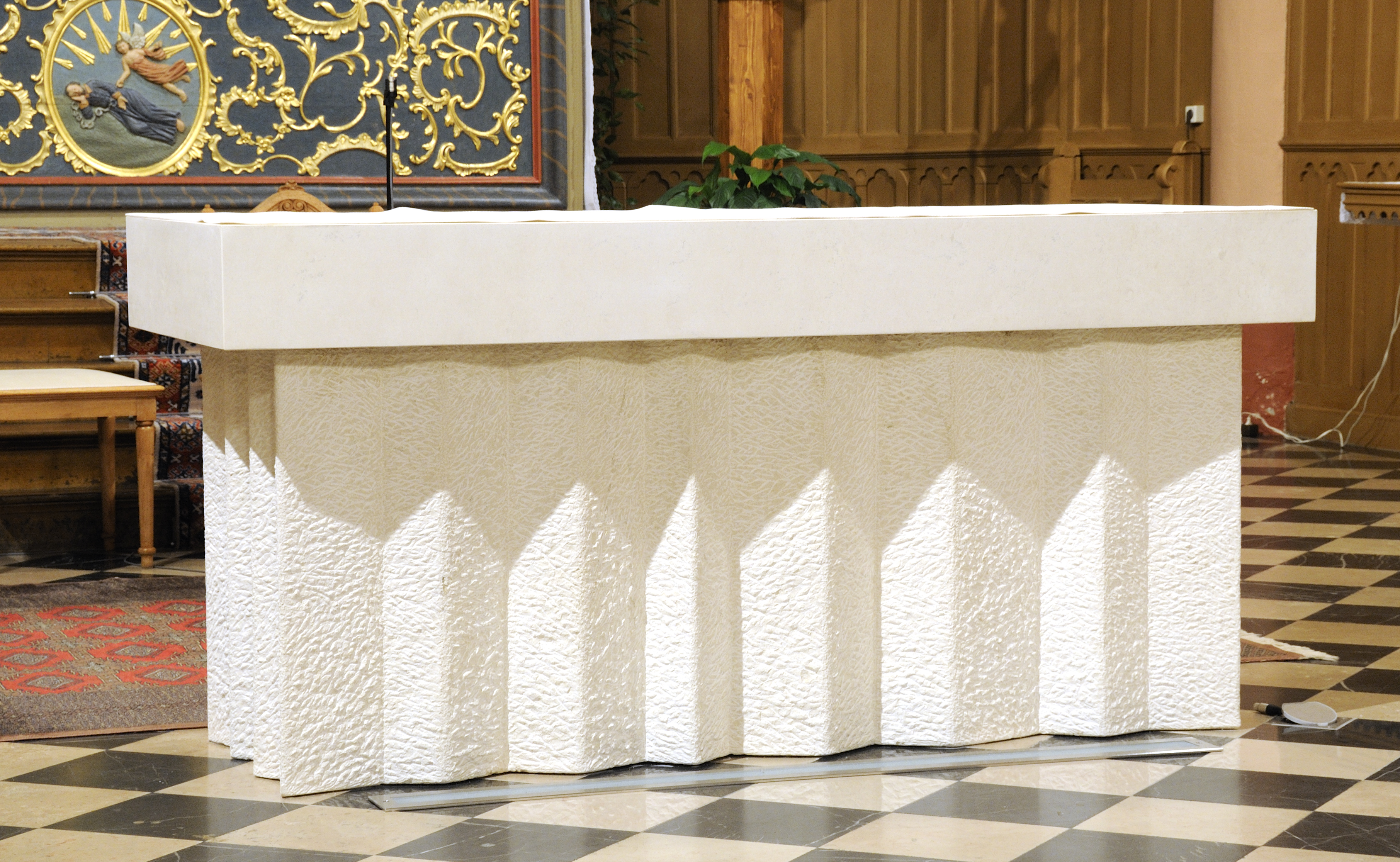 Kierch Äischen: Deen neien Zelebratiounsaltor vun 2008